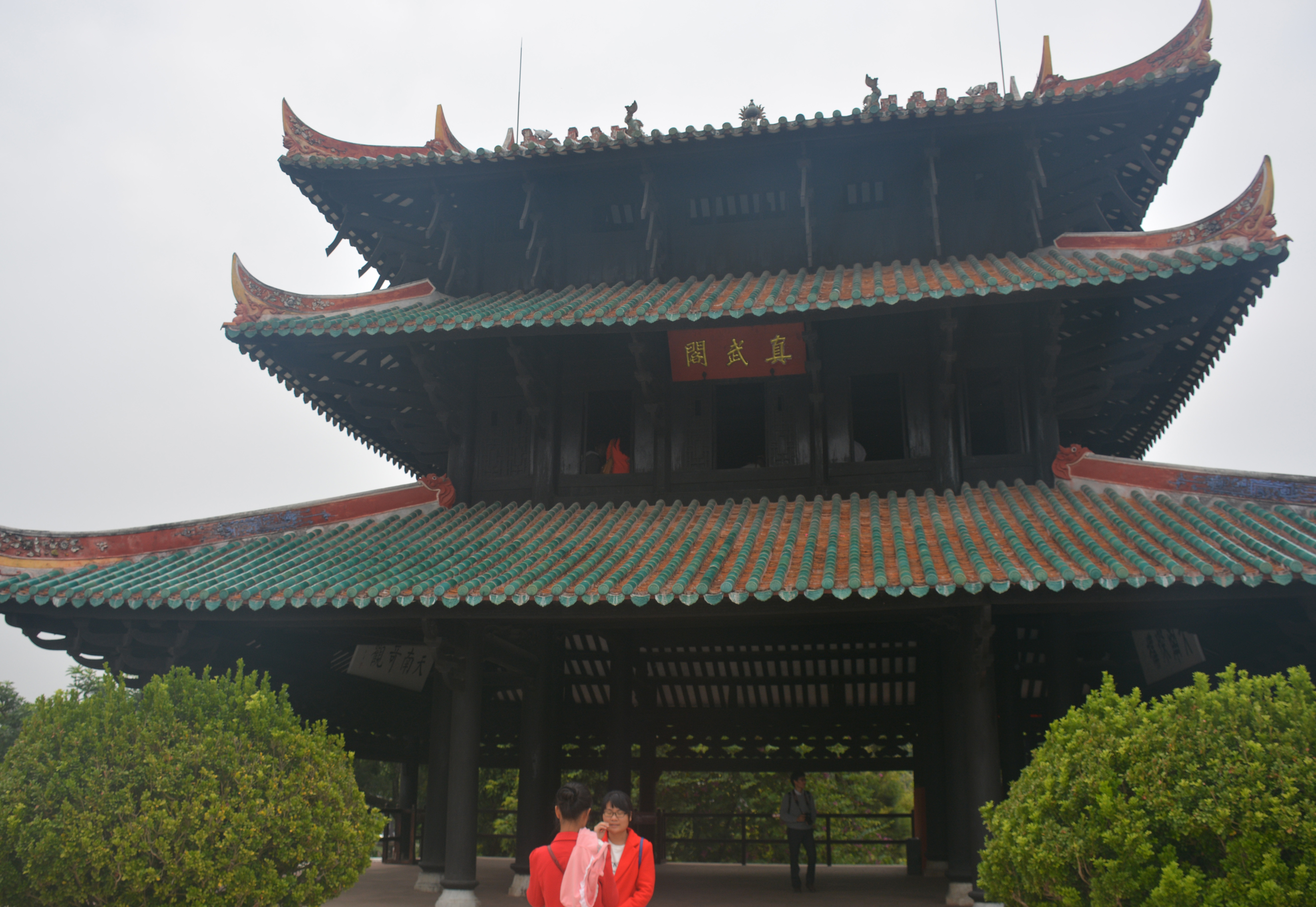 中文（中国大陆）: 摄于容县真武阁。